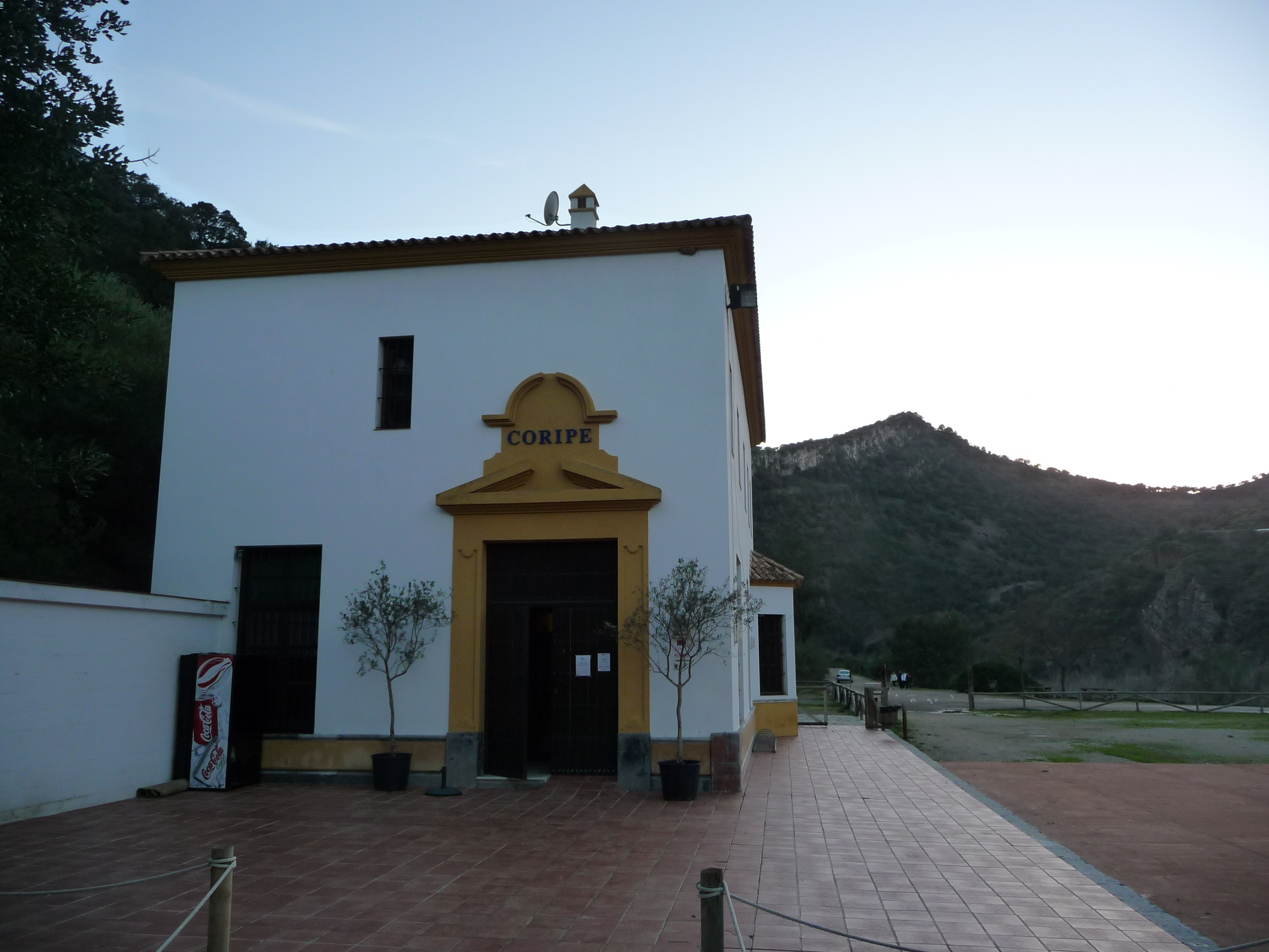 Coripe-P1050965.JPG